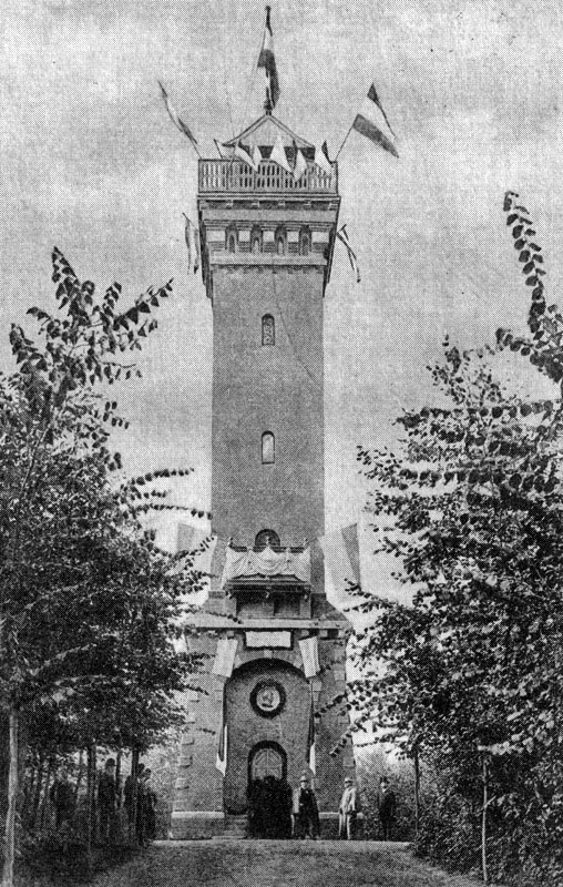 Bismarckturm in Stade